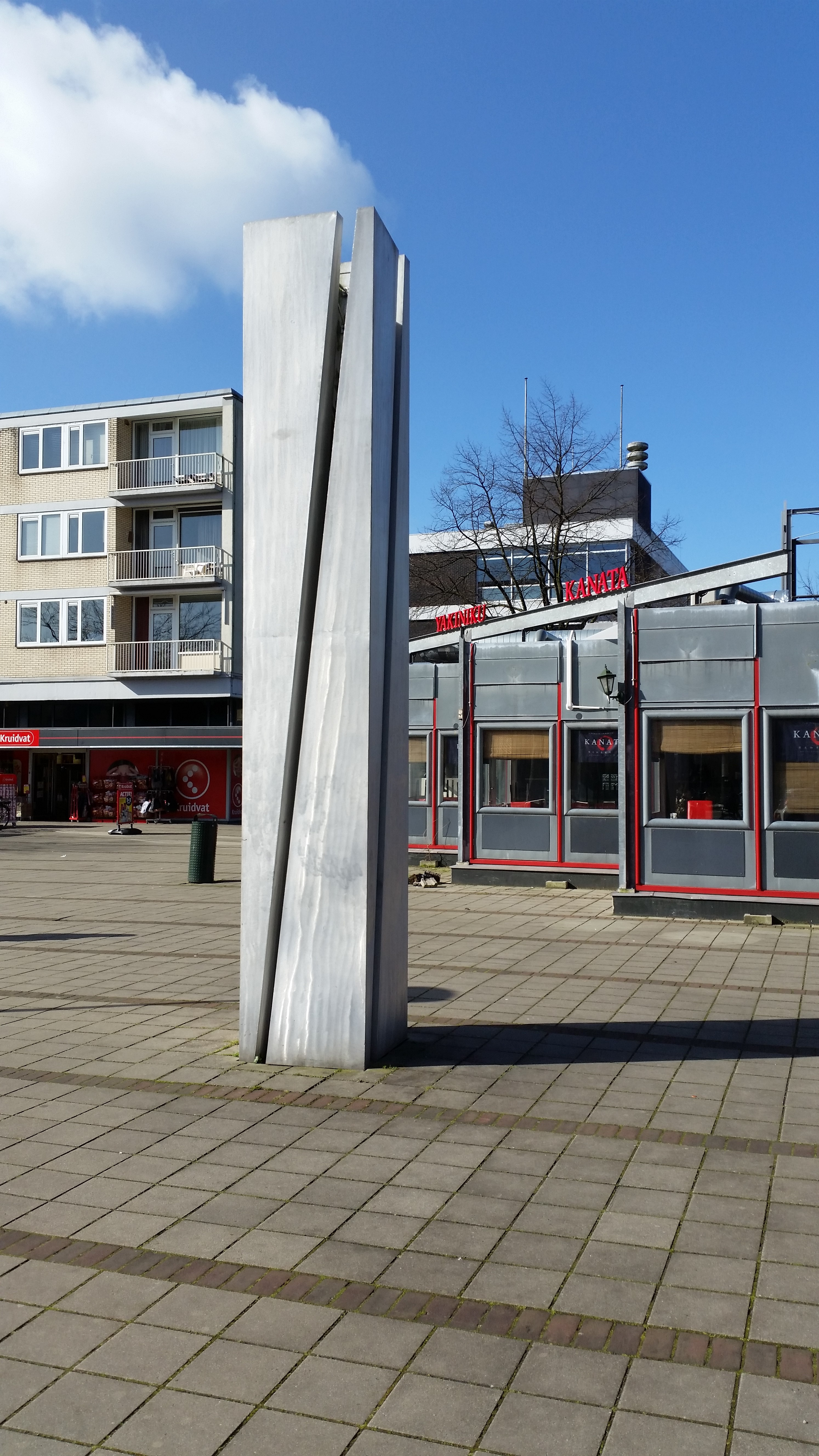 Impressie van de Rooswijck-zuil van Harry Karssen (maart 2020)